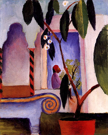 Arabisches Café